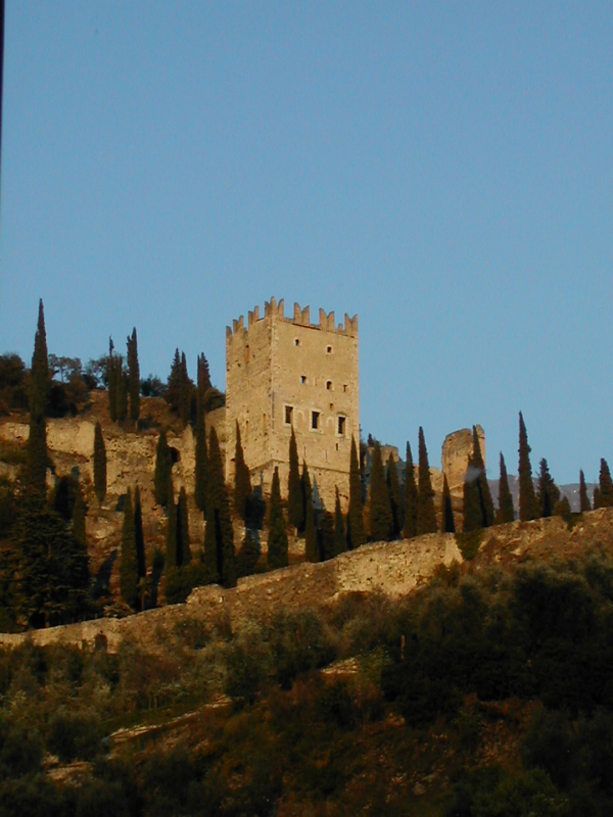 Il Castello di Arco (Trento). Foto scattata nel marzo 2003 da Maurizio Festi.